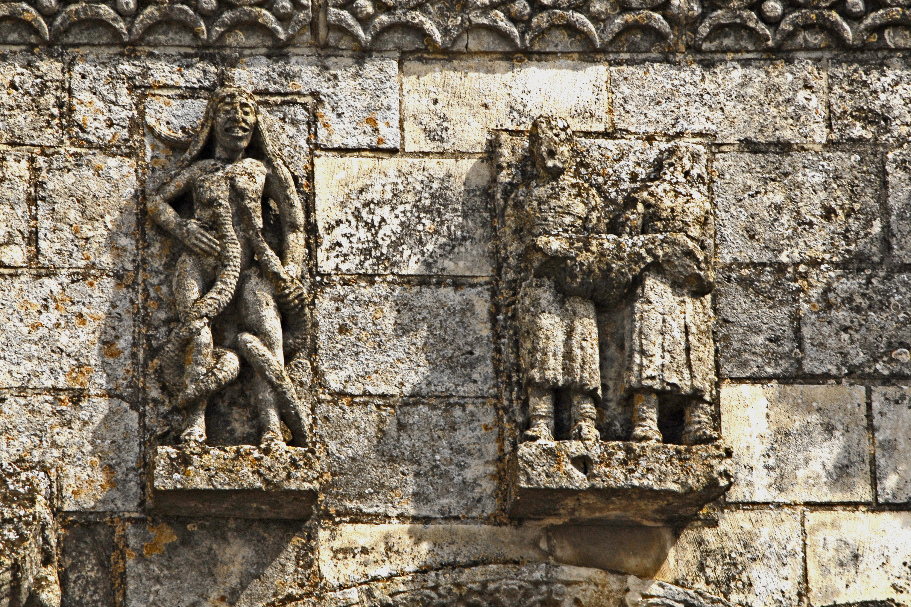 Saint-Jouin-de-Marnes, Relief über rechtem Fenster